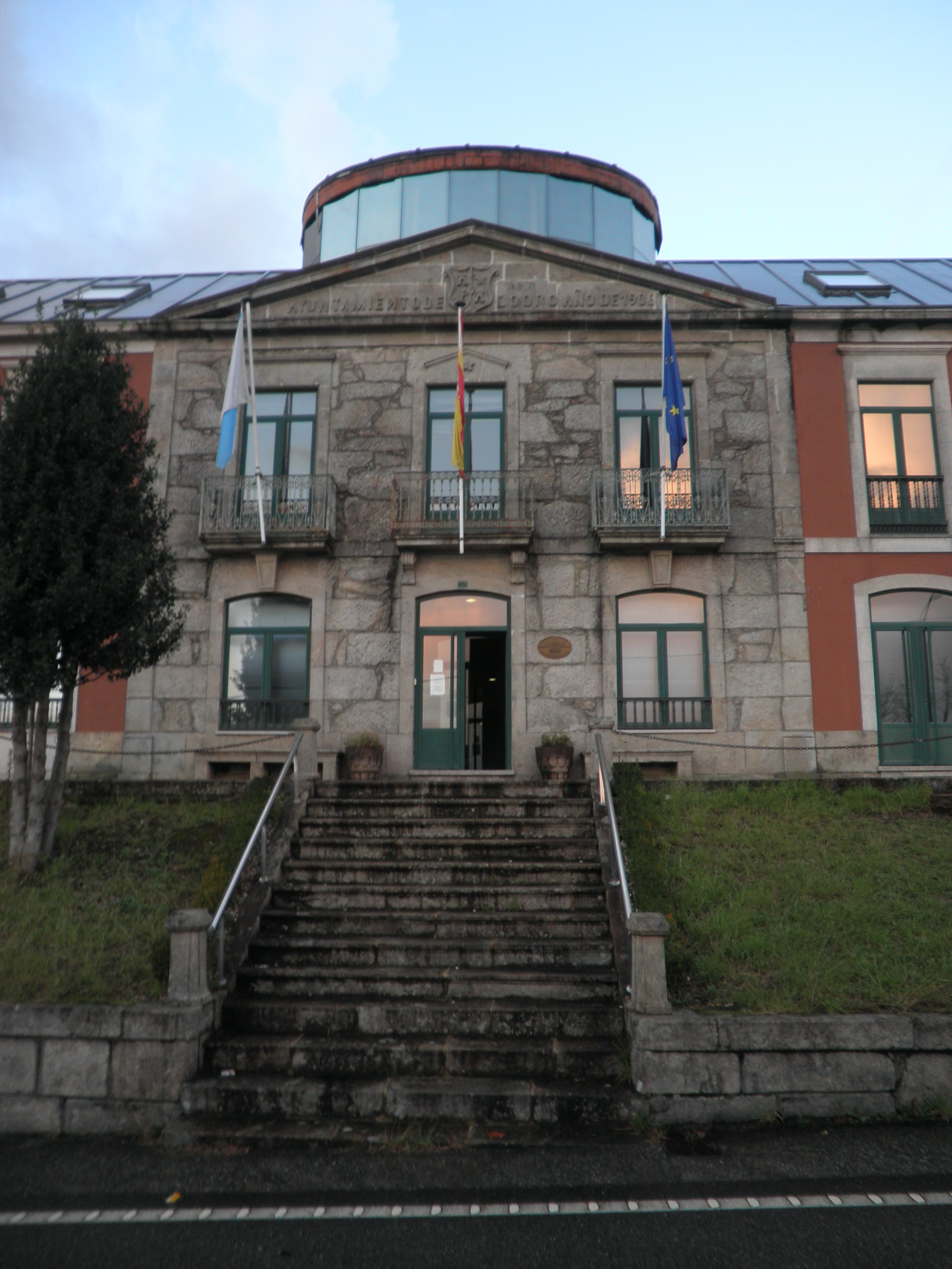 Casa do Concello de Dodro